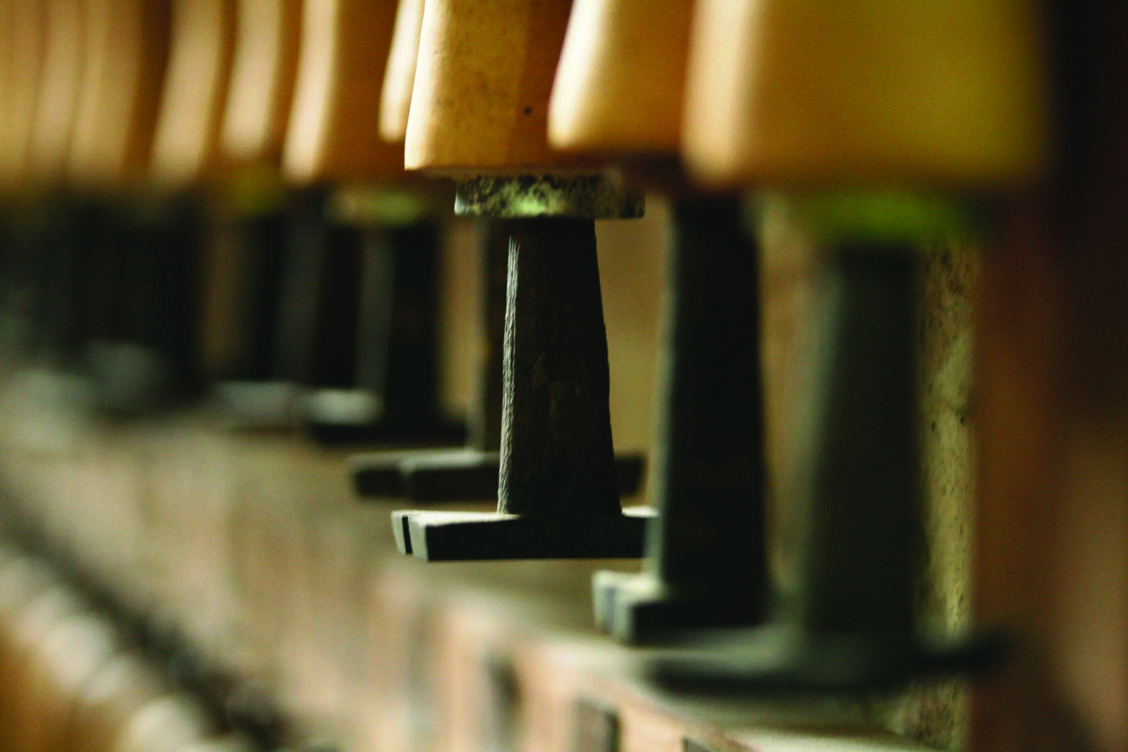 Fi